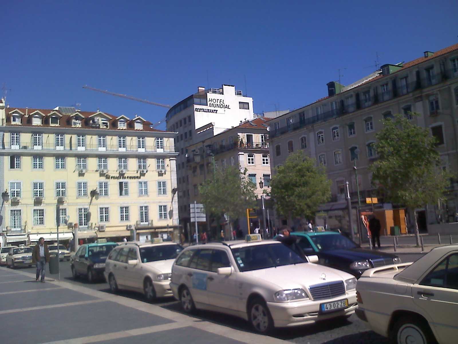 Taxis at Praça da Figueira in Lisbon